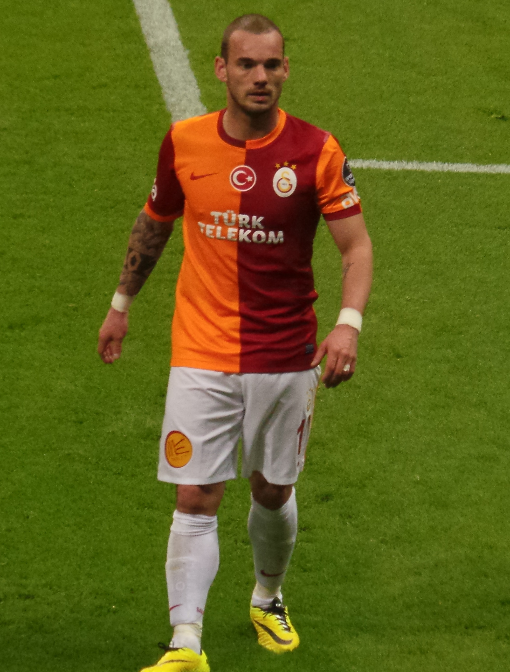 Sneijder gol attığı ilk derbi maçı